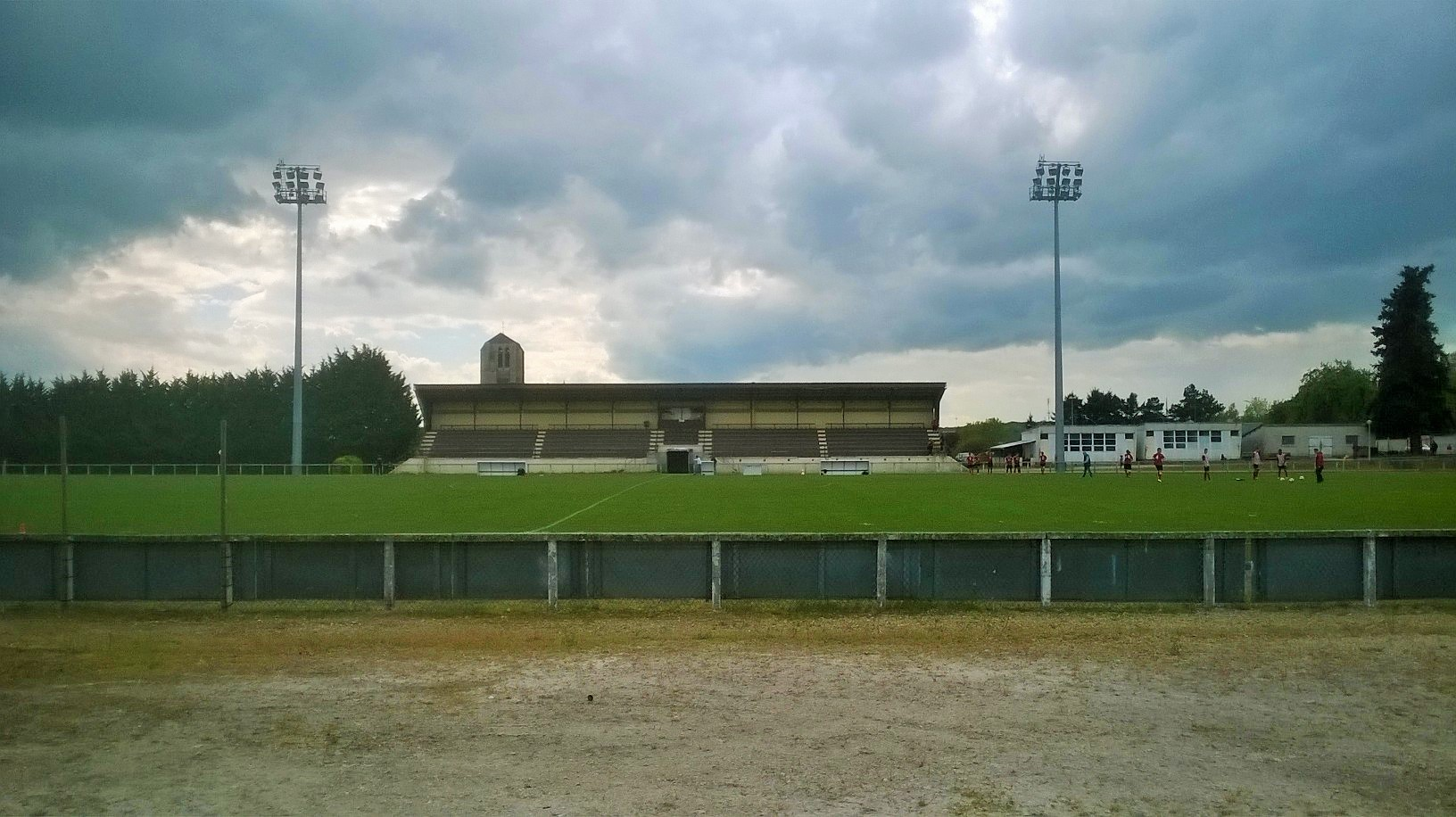 Tribune du stade Kléber et Albert Provost à Châteaudun